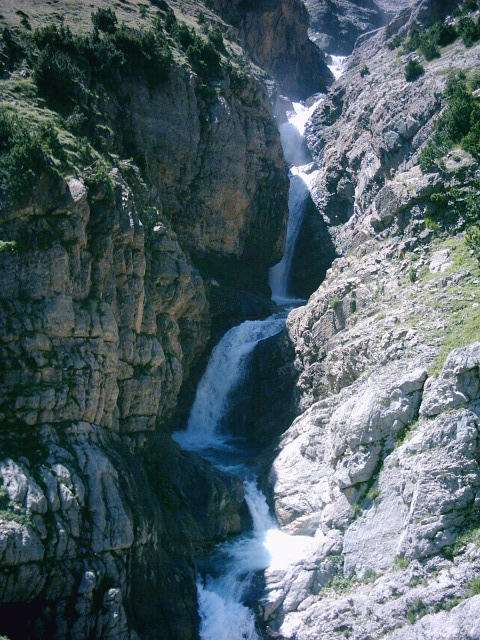 Subiendo al Monte Perdido (España), bonitas cascadas. Barranco de La Larri.